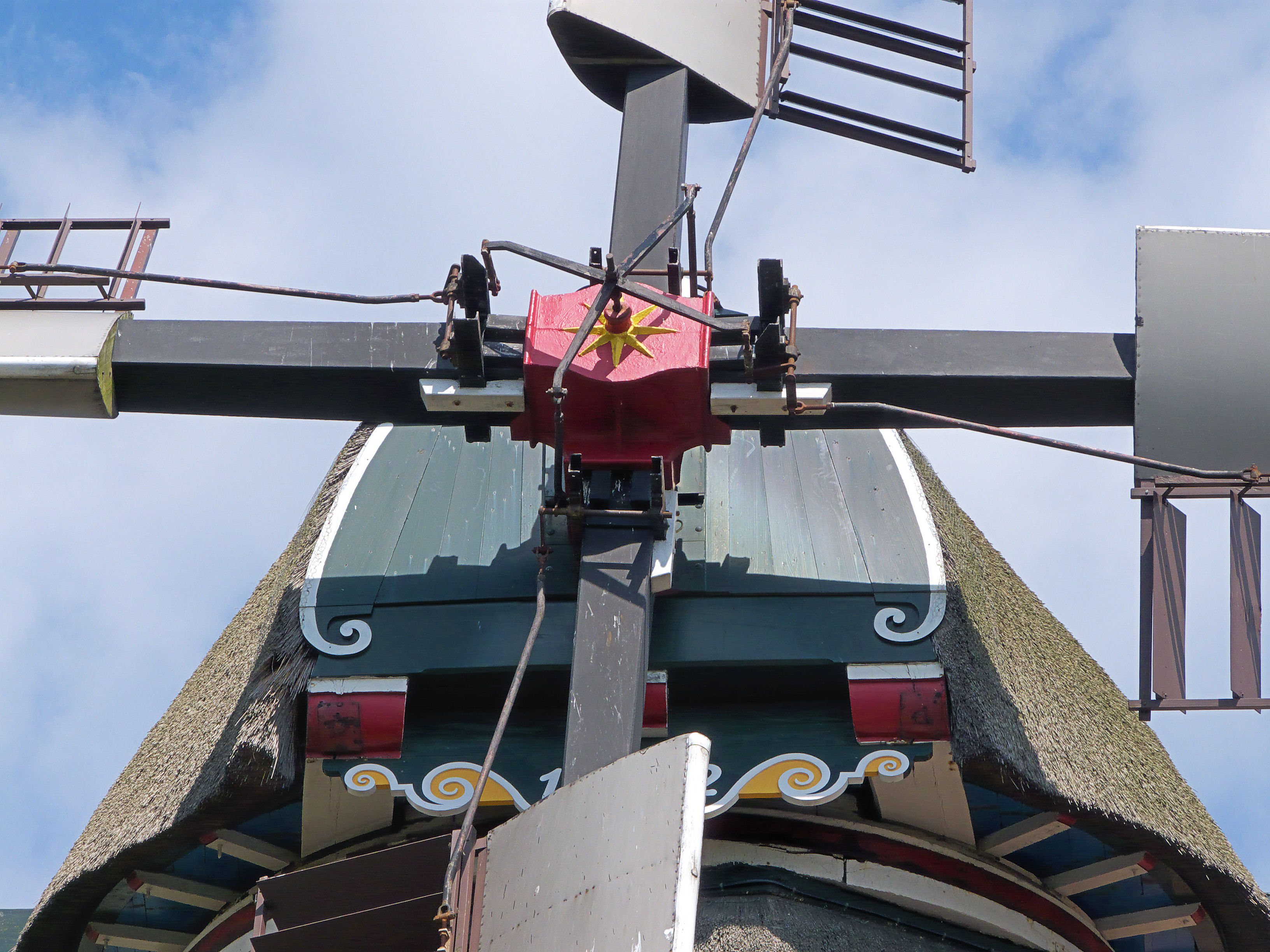 Molen De Traanroeier, Texel, askop met zwichtkruis